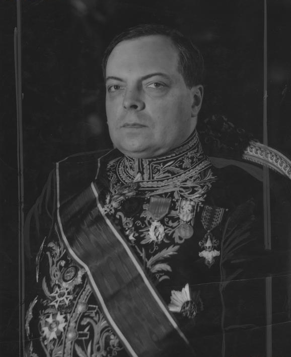 Léon NOËL (1888-1987), conseiller d'Etat, préfet, ambassadeur de France, député, premier président du Conseil constituionnel